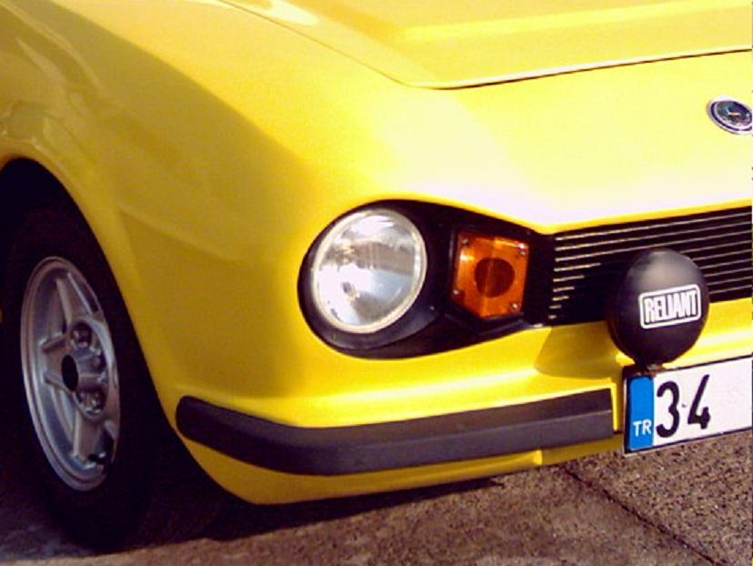 Türkiye'de seri olarak üretilen ilk otomobil markası Anadol'dan bir görünüm.